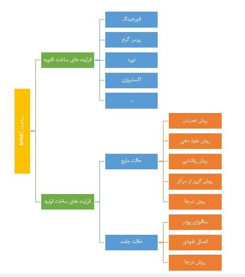 MMc manufacturing